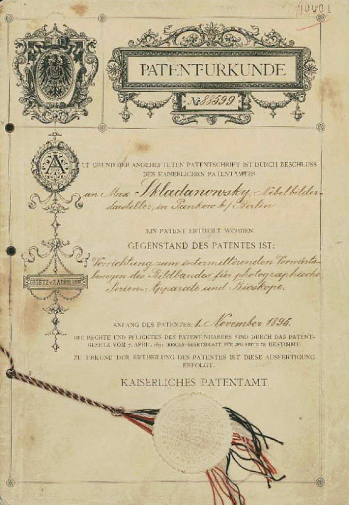 Bioskop: Patenturkunde Nr. 88599 vom 1. November 1895.